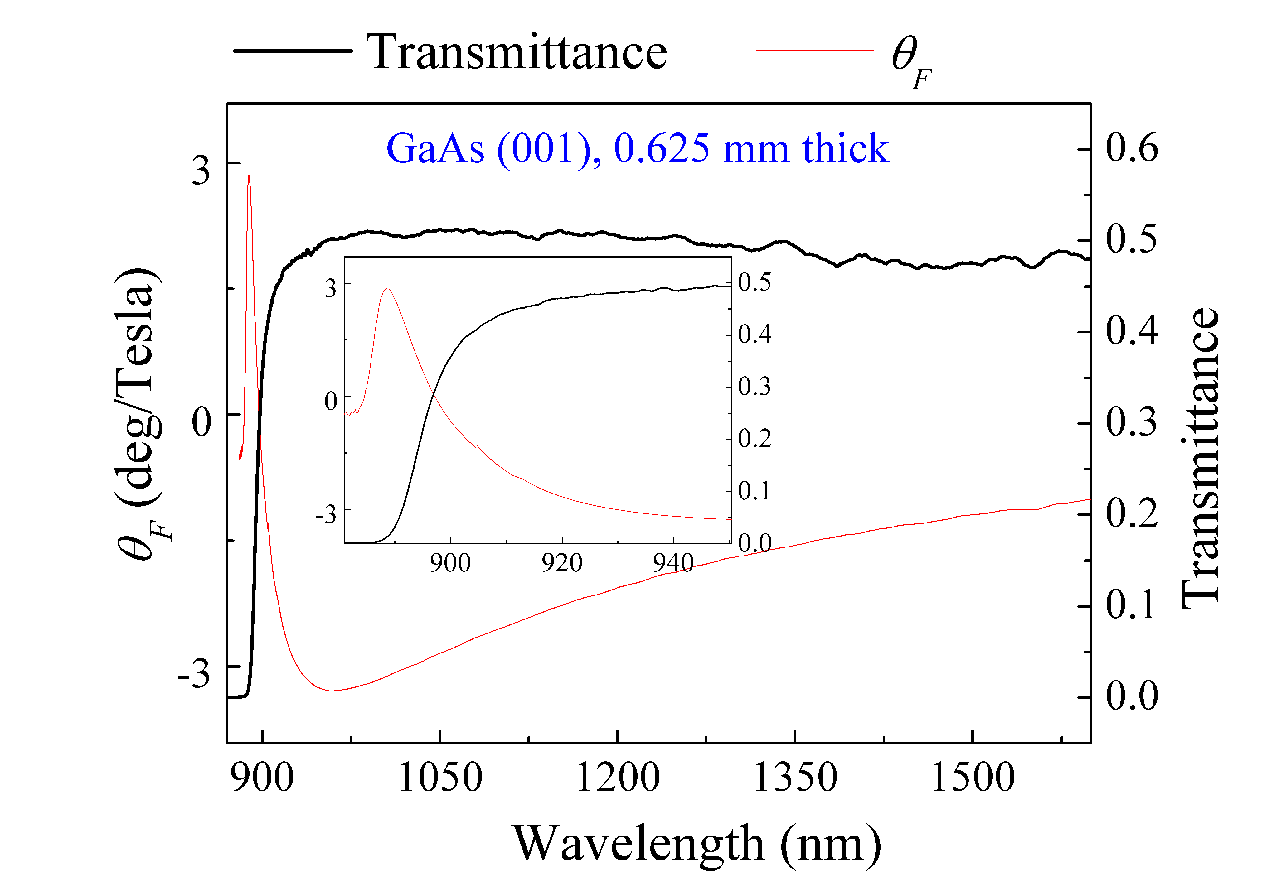 砷化镓带边附近的磁光谱